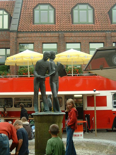 Brunnen am Möllner Marktplatz (Aufnahme während des Möllner Altstadtfestes) Lesende Kinder.